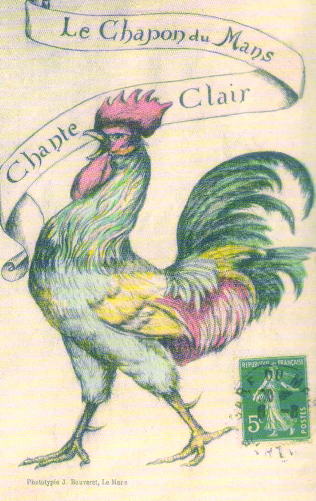 Une carte postale représentant le chapon Chanteclair